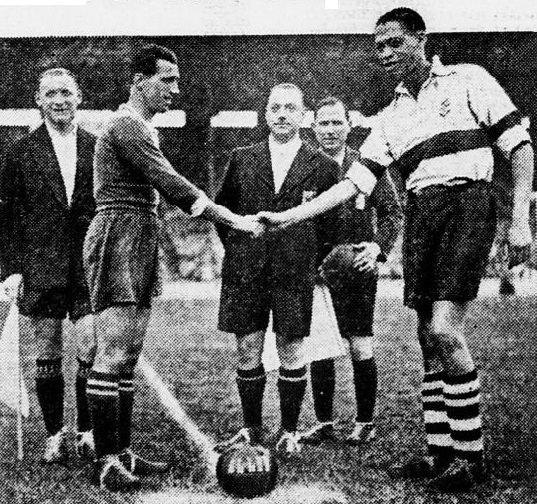 Demi-finale de la Coupe Simon 1941, les capitaines girondin (G.) et toulousain (Diagne à D.) se serrent la main.